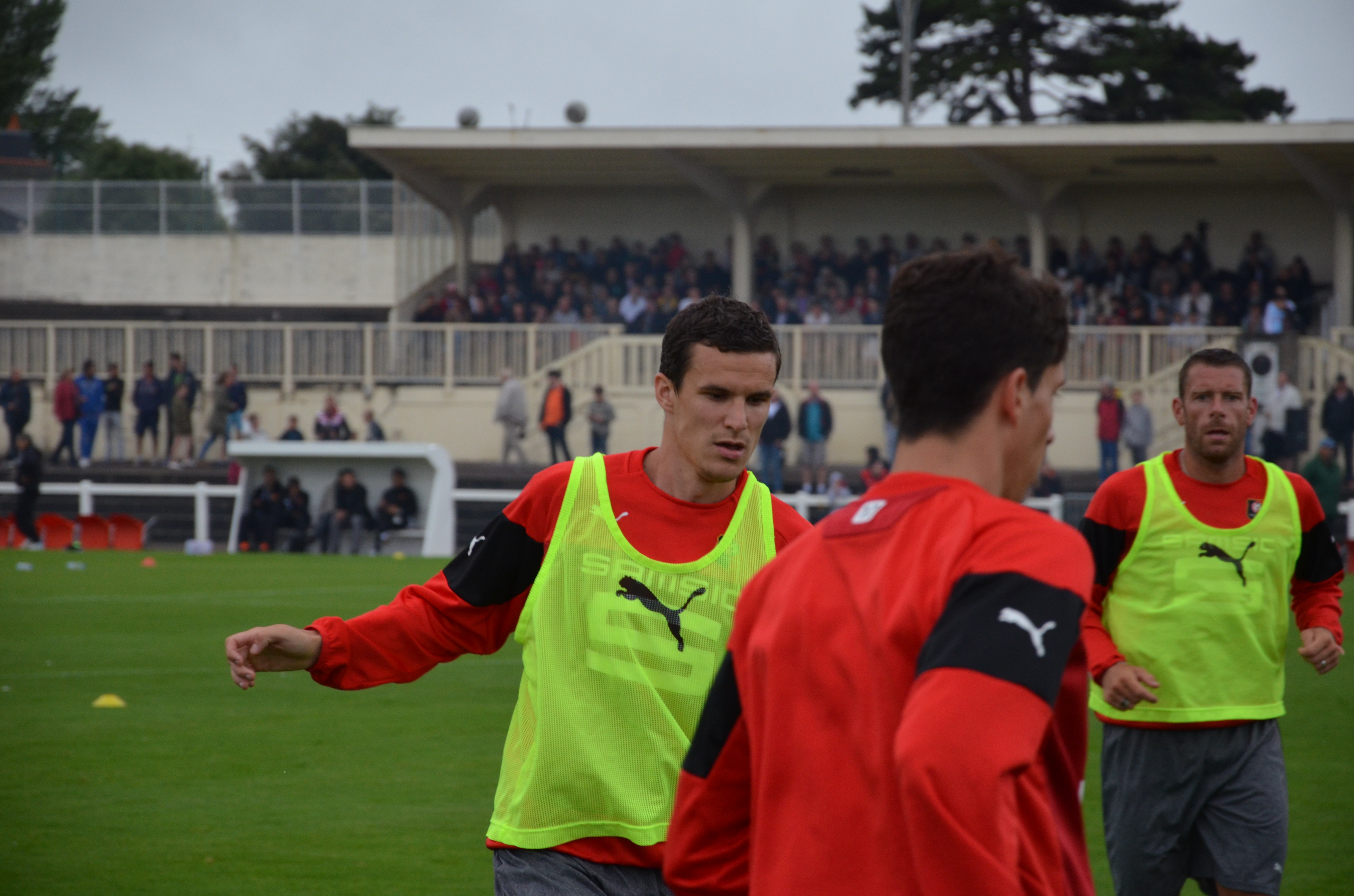 Photo prise lors de l'échauffement des joueurs du Stade rennais avant un match amical face à l'US Orléans au stade Paul-Audrin de Dinard. Ici, Romain Danzé.